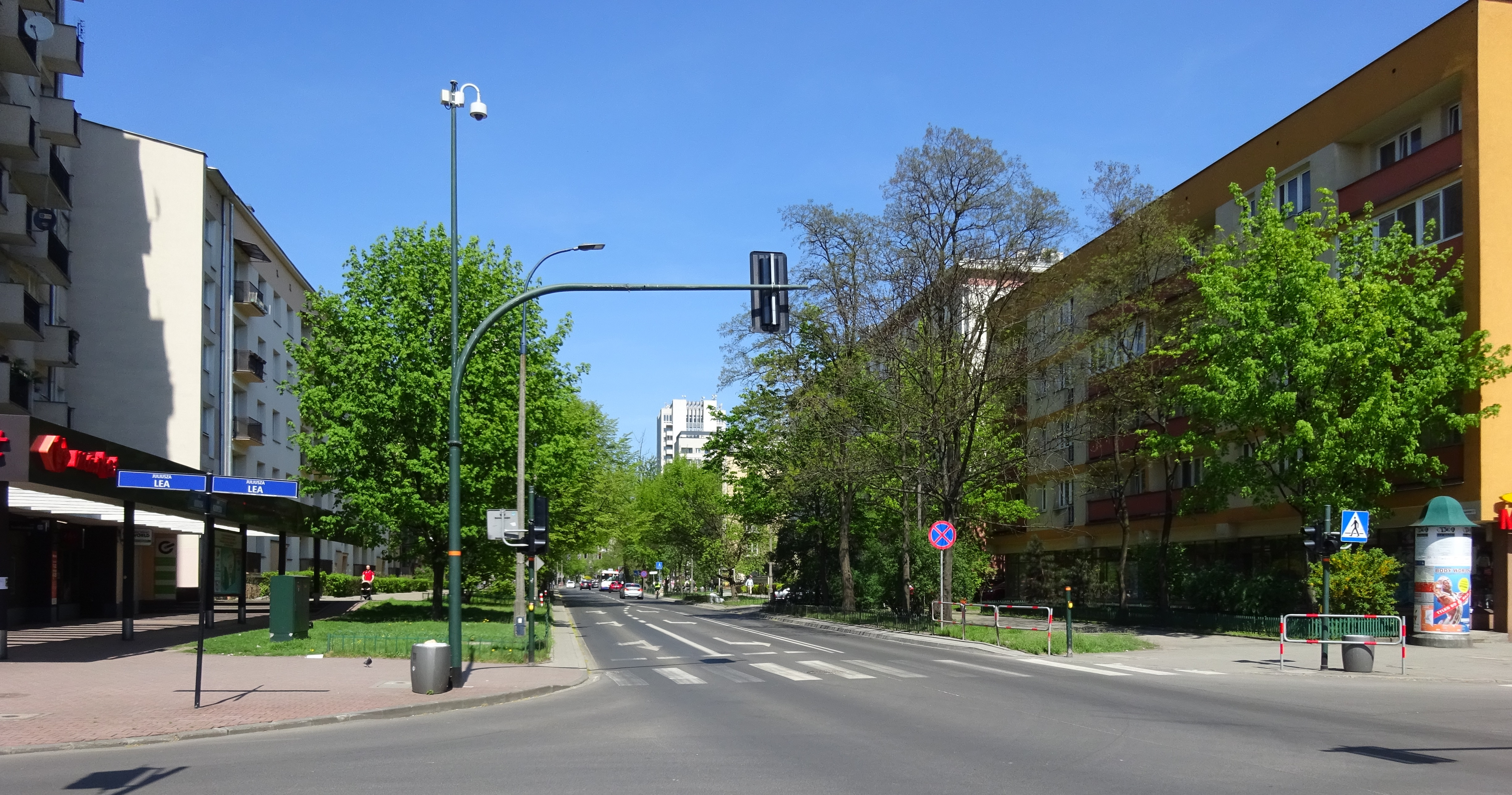 Aleja Kijowska w Krakowie. Widok w kierunku północnym od skrzyżowania z ulicą Juliusza Lea. 2018